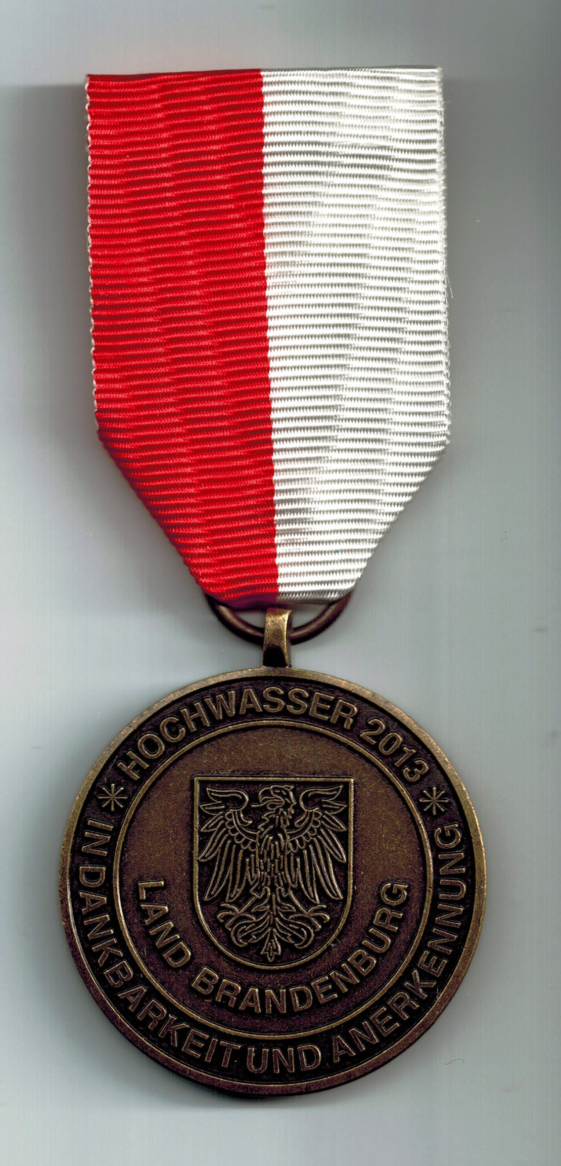 Brandenburgische Hochwassermedaille 2013, Vorderseite